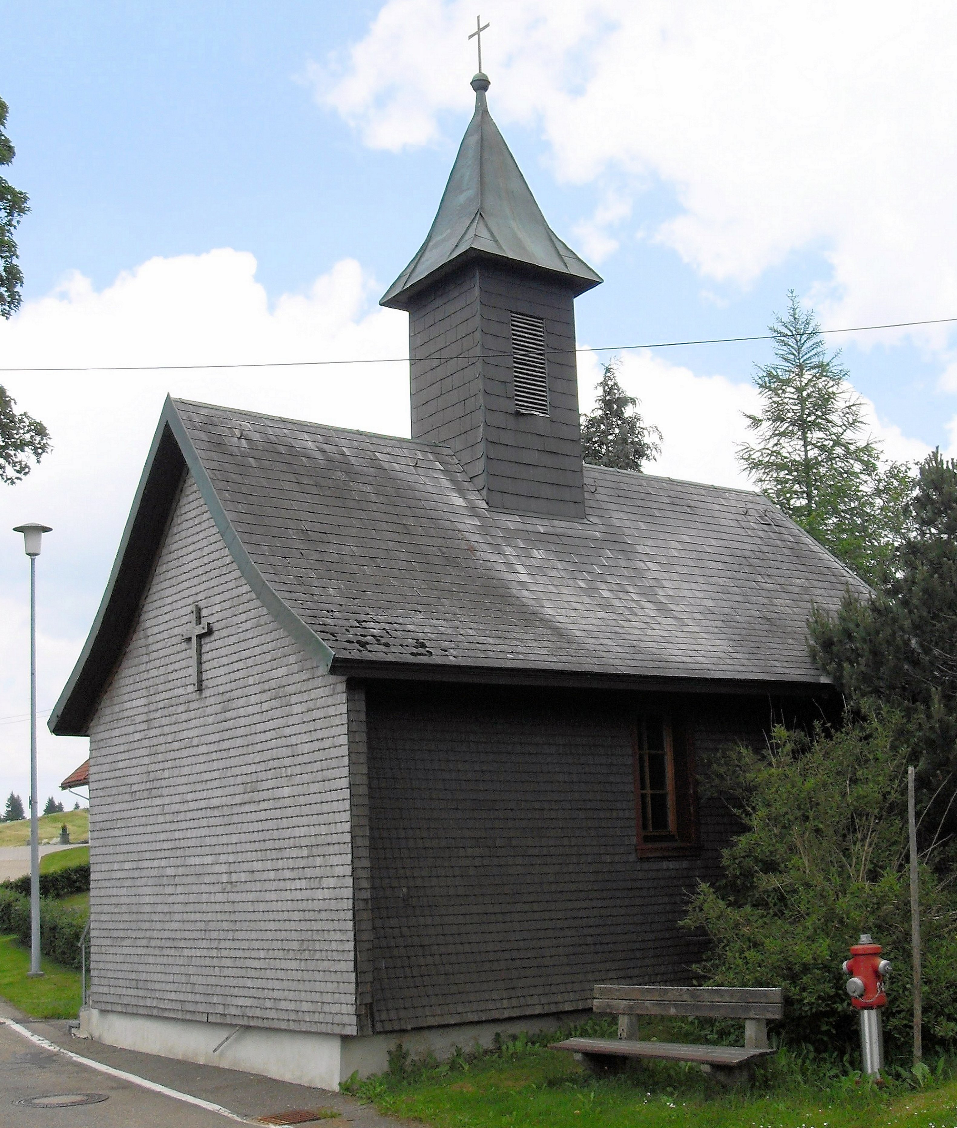 Kapelle in Herrenschwand, Stadt Todtnau, Schwarzwald, Deutschland